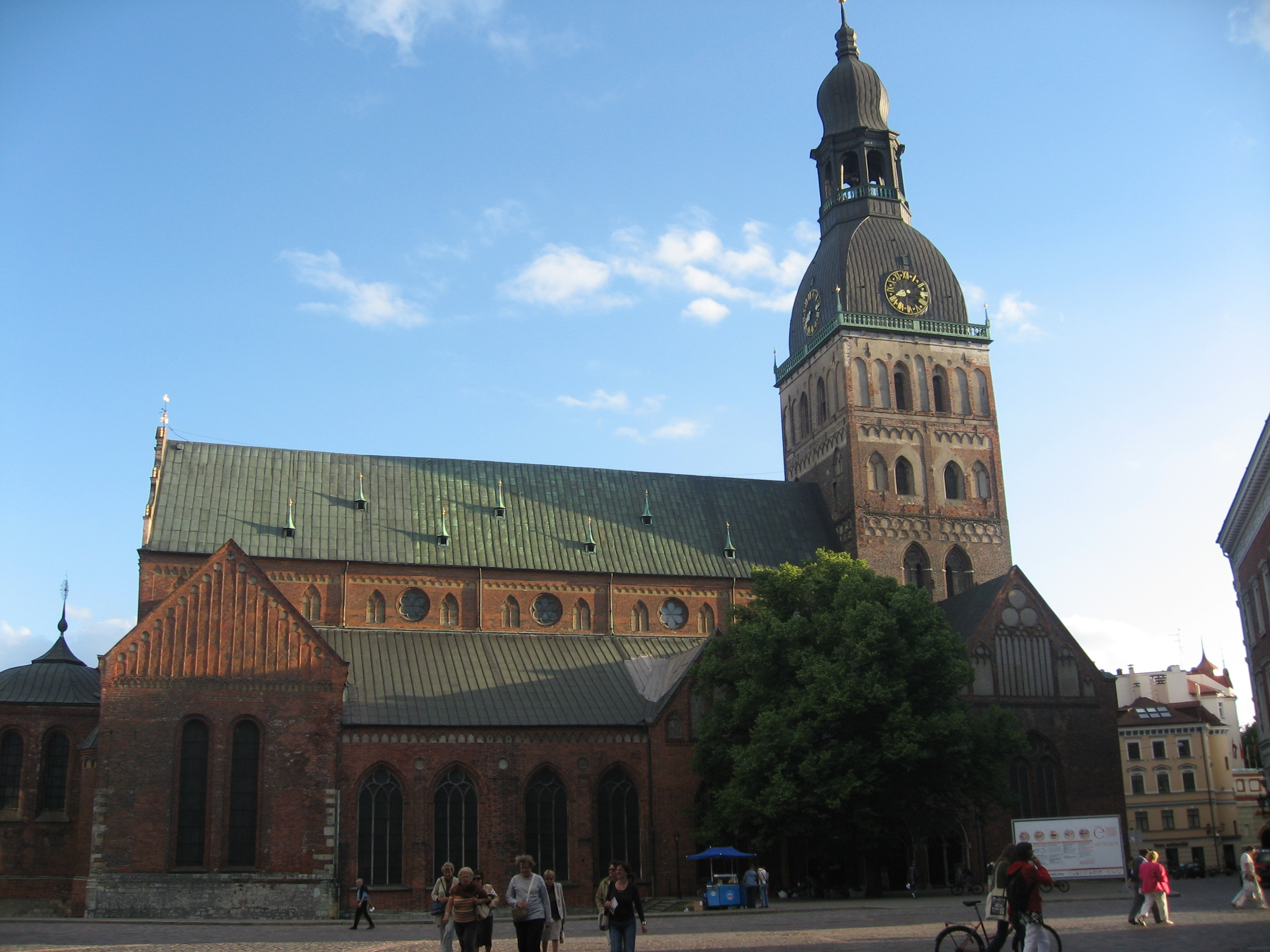 Rīgas doms